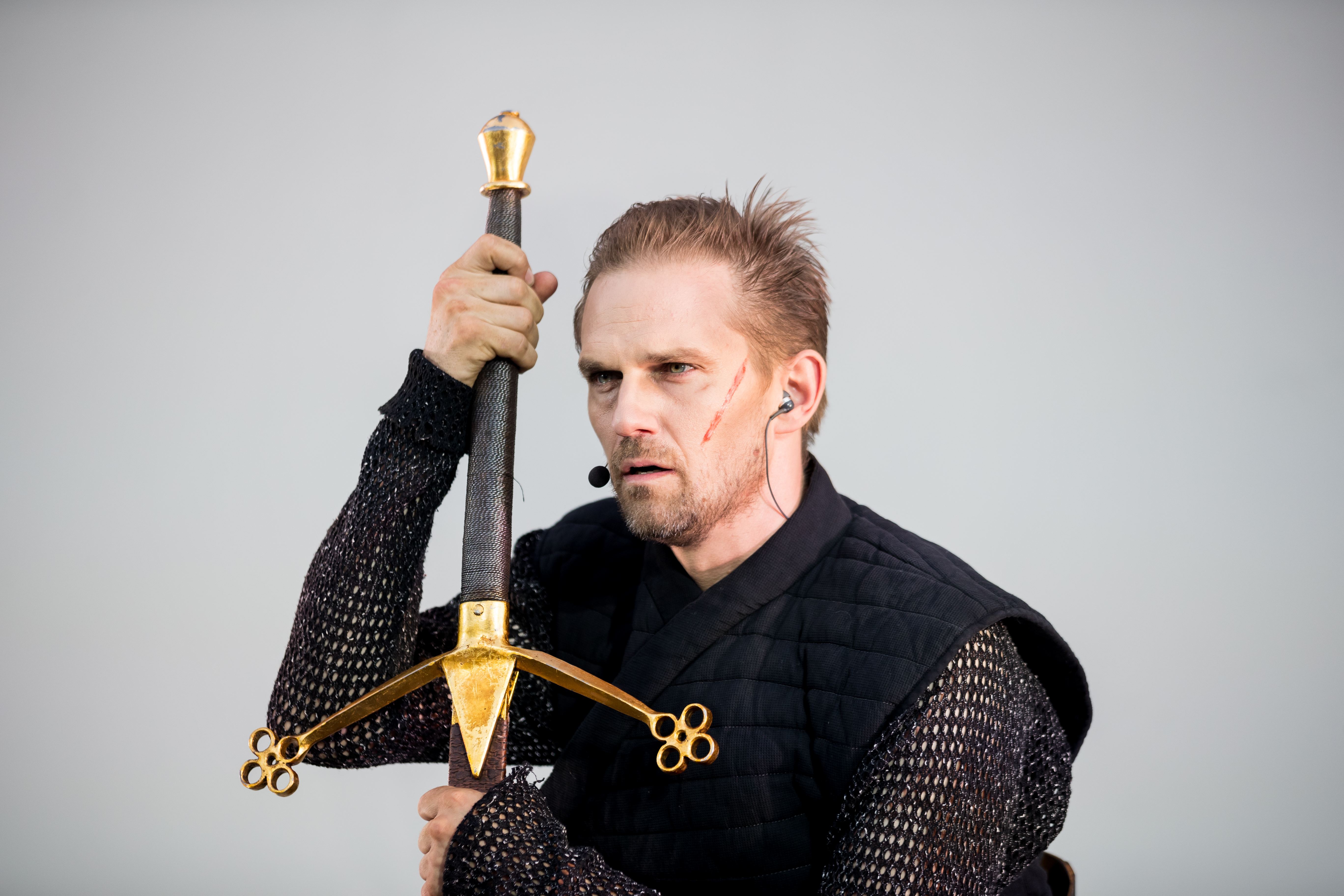 Daniel Lommatzsch during Nibelungenfestspiele "Siegfrieds Erben" at Wormser Dom, Worms, Rheinland-Pfalz, Germany on 2018-07-19, Photo: Sven Mandel